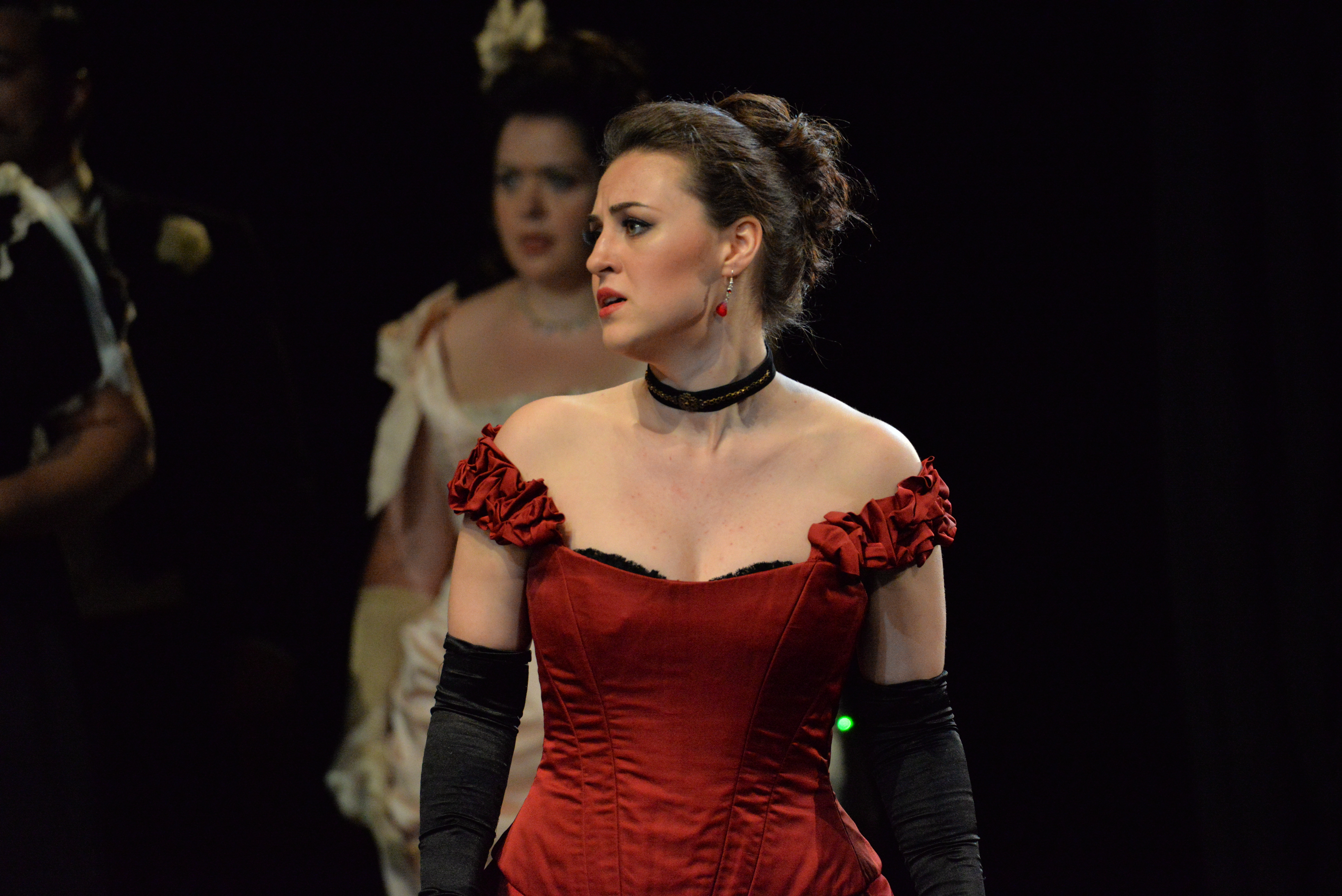 Venera Gimadieva